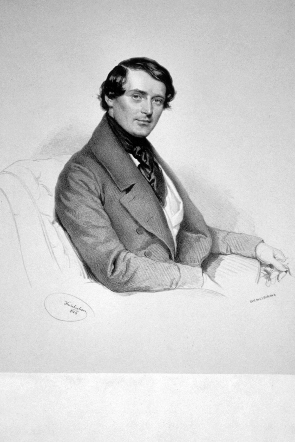 Karl Ludwig von Littrow (* 1811; † 1877), Lithographie von Josef Kriehuber, 1846